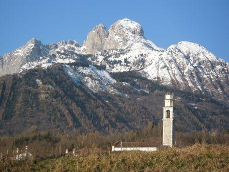 Giacomo Andrich, opera propria, il monte Pizzocco con davanti il campanile della chiesa